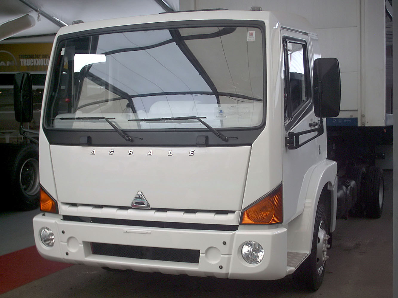 Brazilian brand. Salon del transporte 2008.